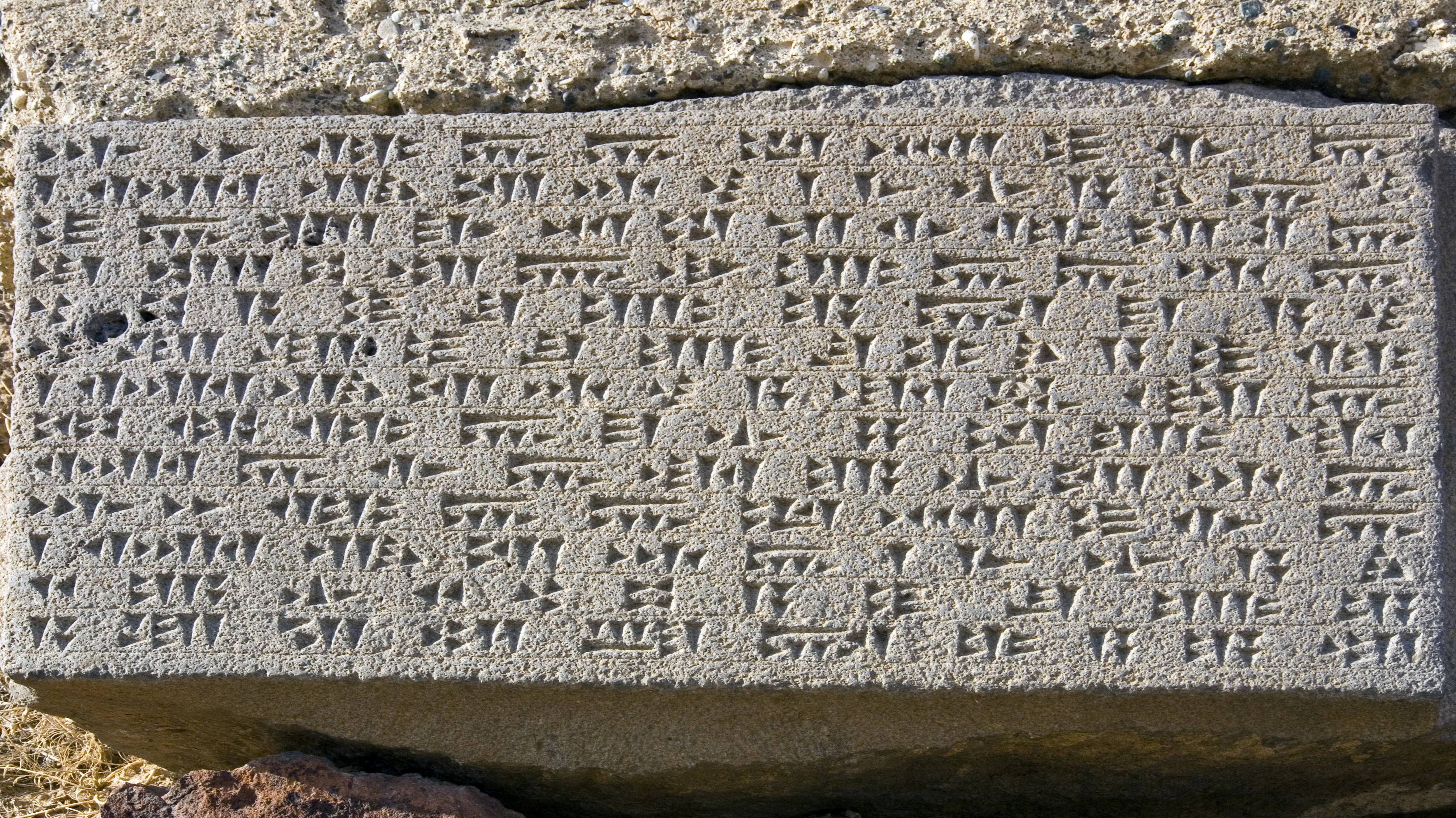 Urartian cuniform. Old tablet. Erebuni, Armenia.